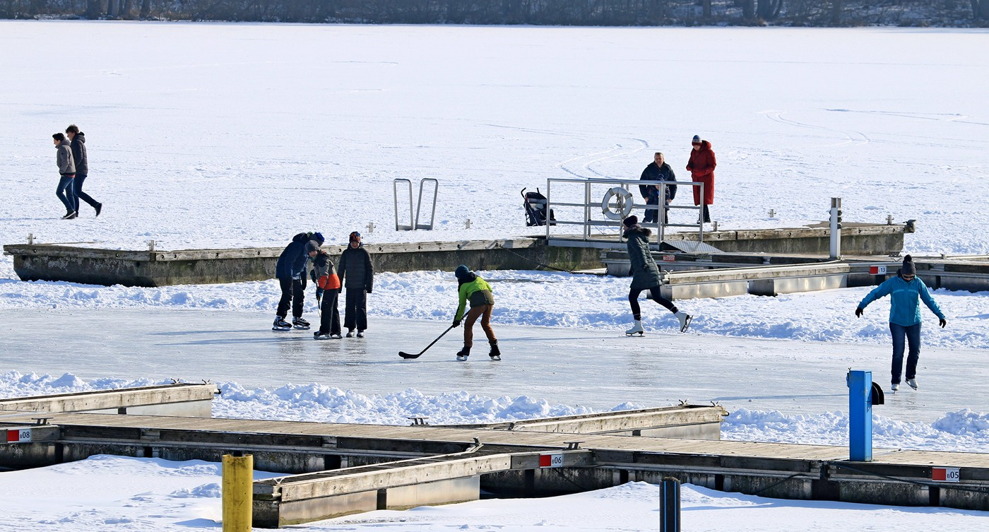 Kraniche und Singschwäne auf der zugefrorenen Müritz